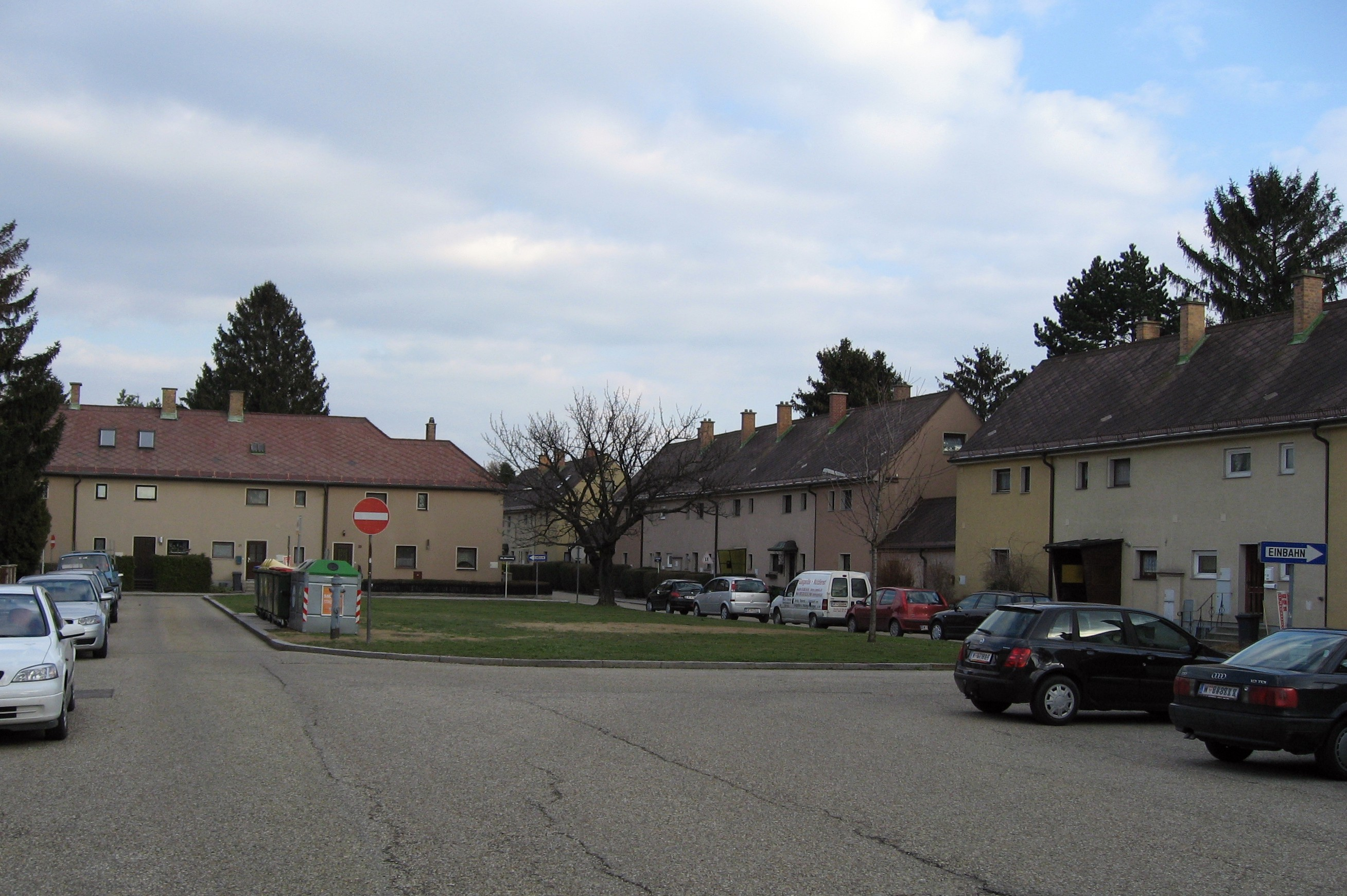 Siedlung Am Müllnermais, Wien Donaustadt